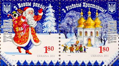 Новогодние марки с Дедом Морозом. Украина